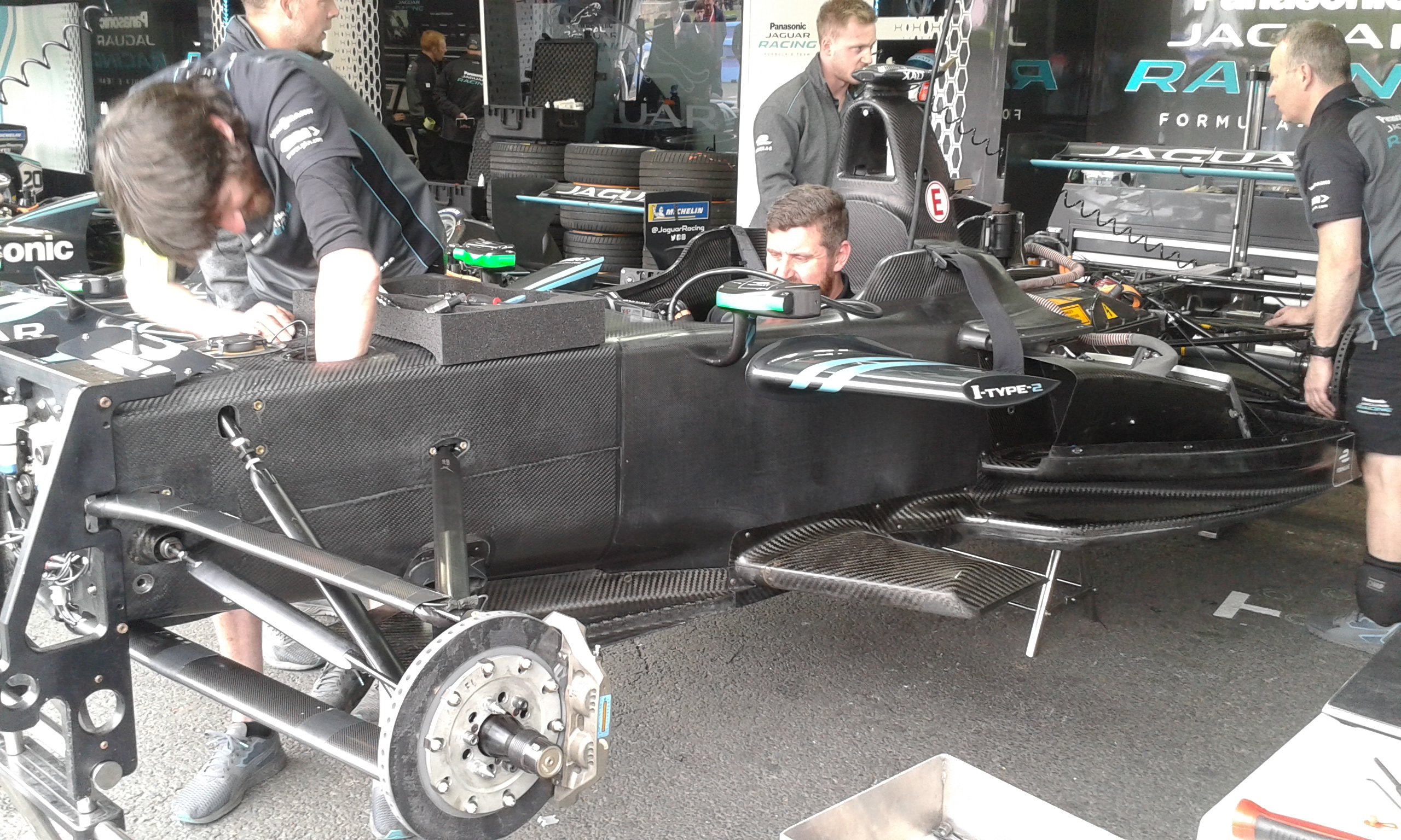 Jaguar-Mechaniker reparieren das beschädigte Fahrzeug von Nelson Piquet jr. beim Paris E-Prix 2018